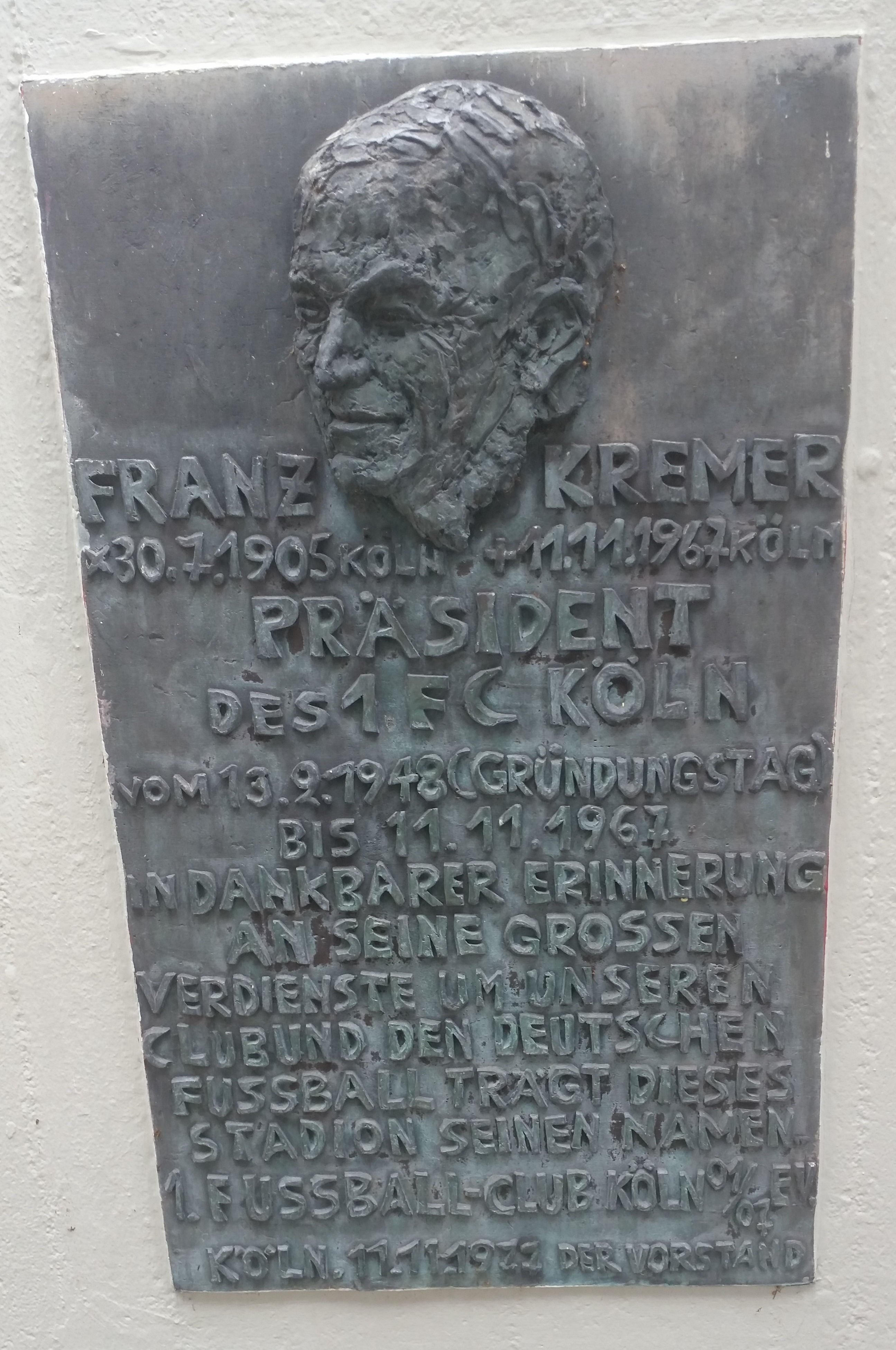 Denkmal für Franz Kremer, dem ersten Präsidenten des 1. FC Köln im Franz Kremer Stadion.